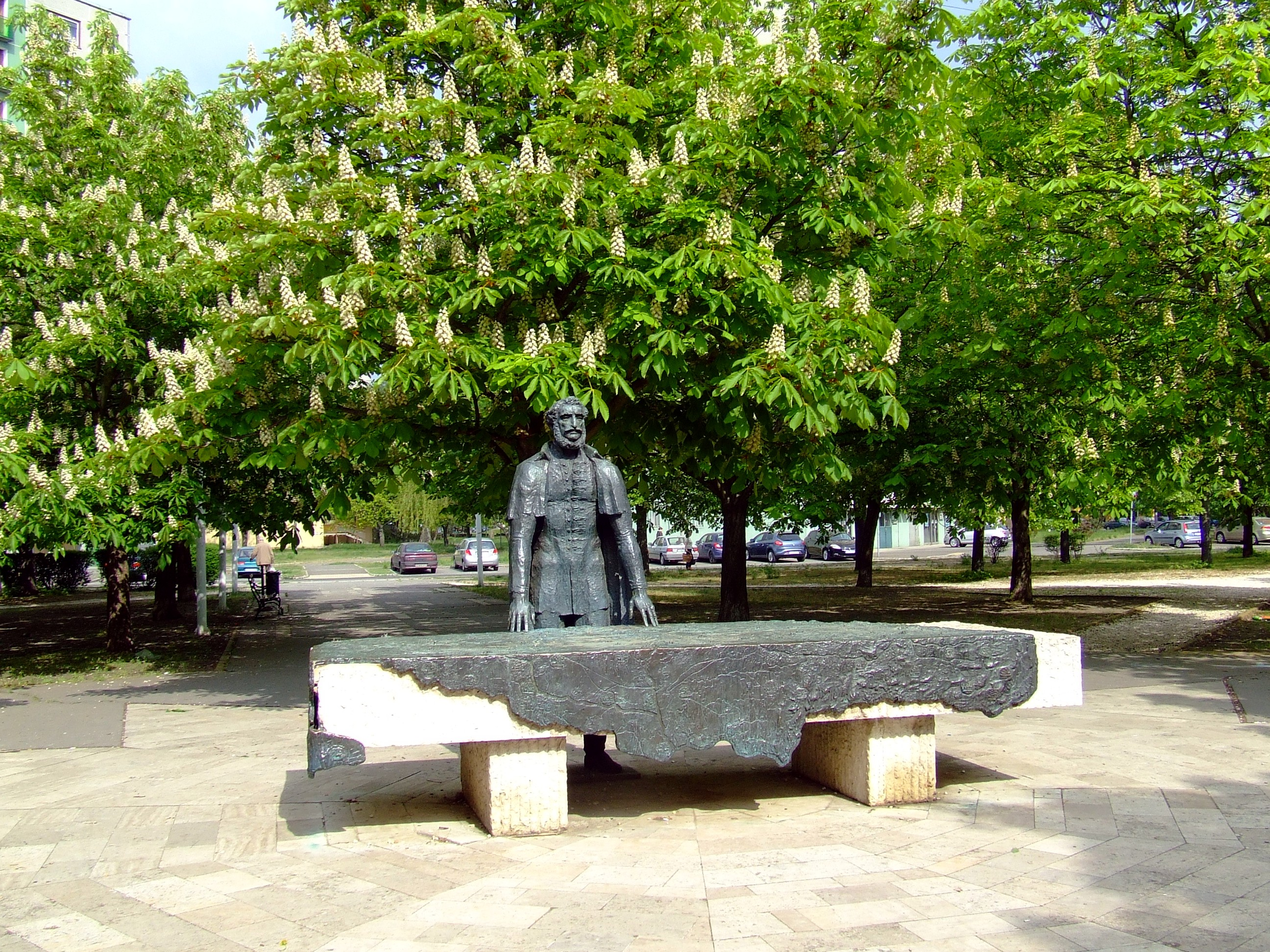 Széchenyi István szobra Kecskeméten. Kiss István szobrászművész és Kerényi József építész alkotása (1982)